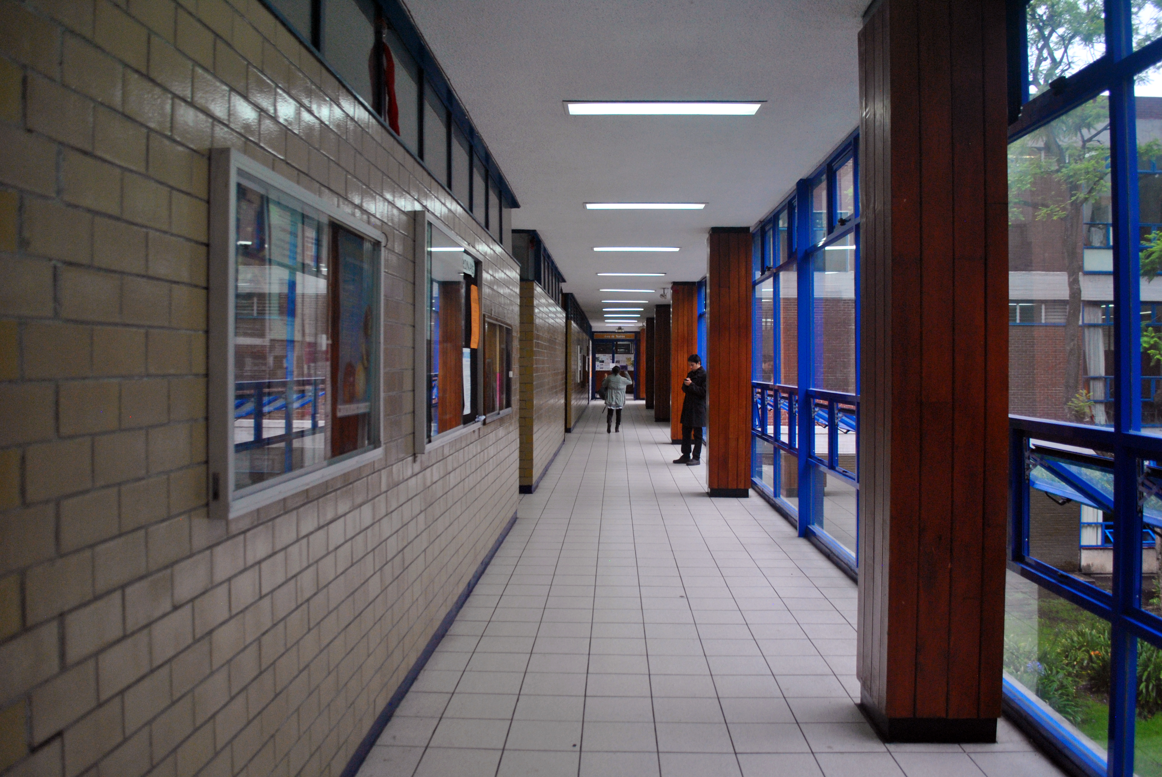 Facultad de Filosofía y Letras de la UNAM. Ciudad de México.